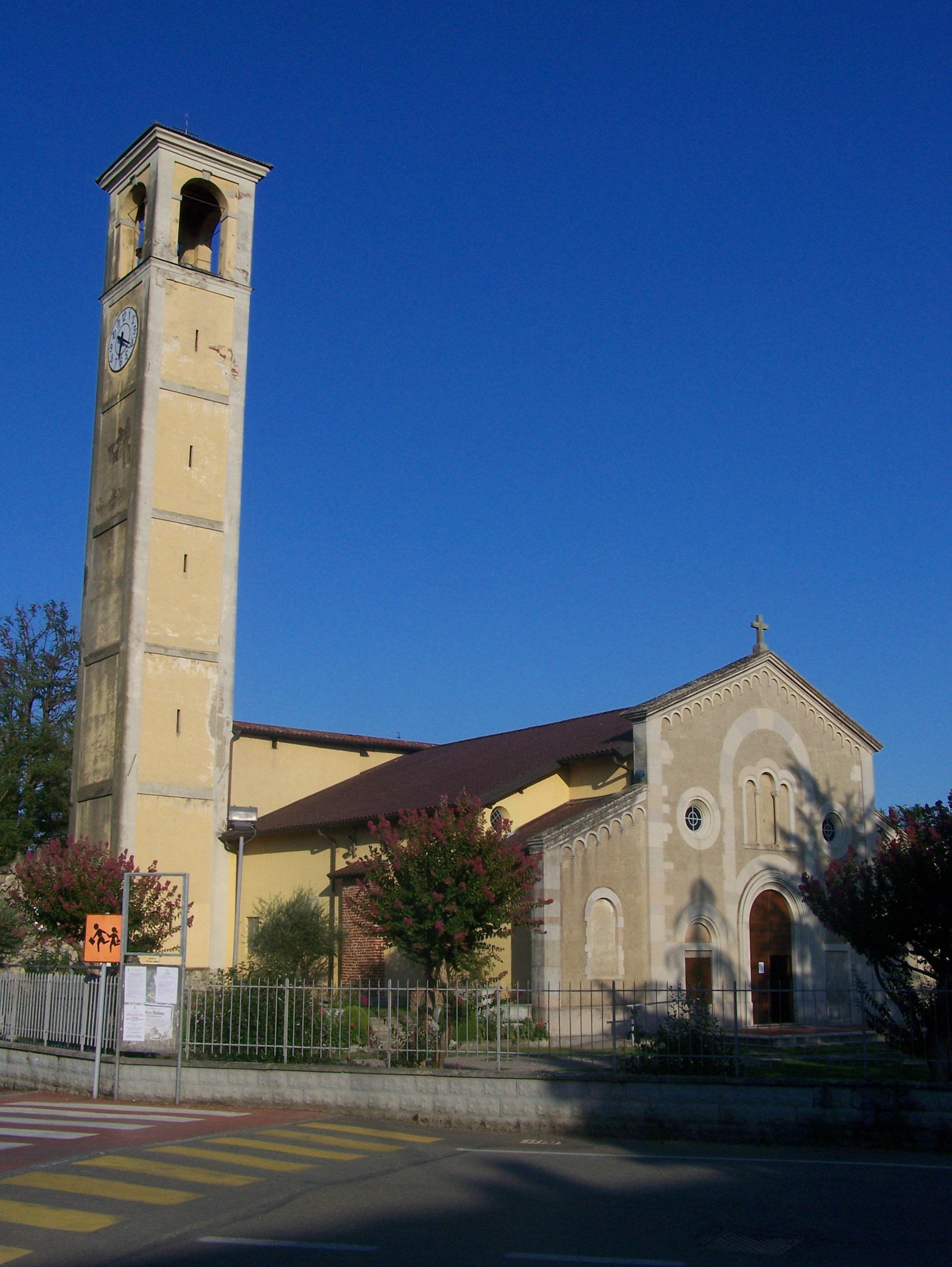 Chiesa di Bestazzo, frazione di Cisliano (MI)